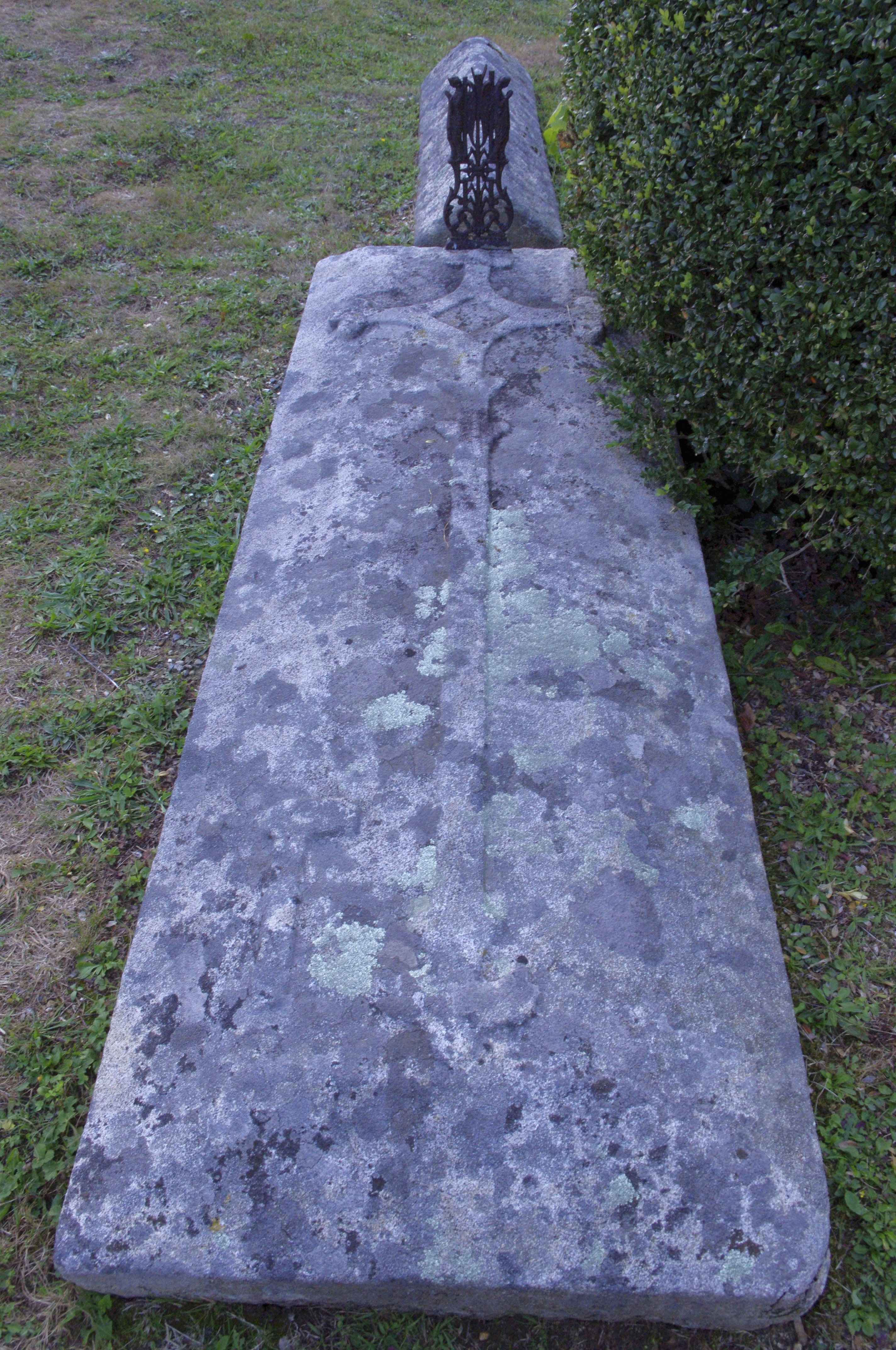 Le Chalard, Haute-Vienne, Frankreich - Grab eines Webers aus dem Mittelalter